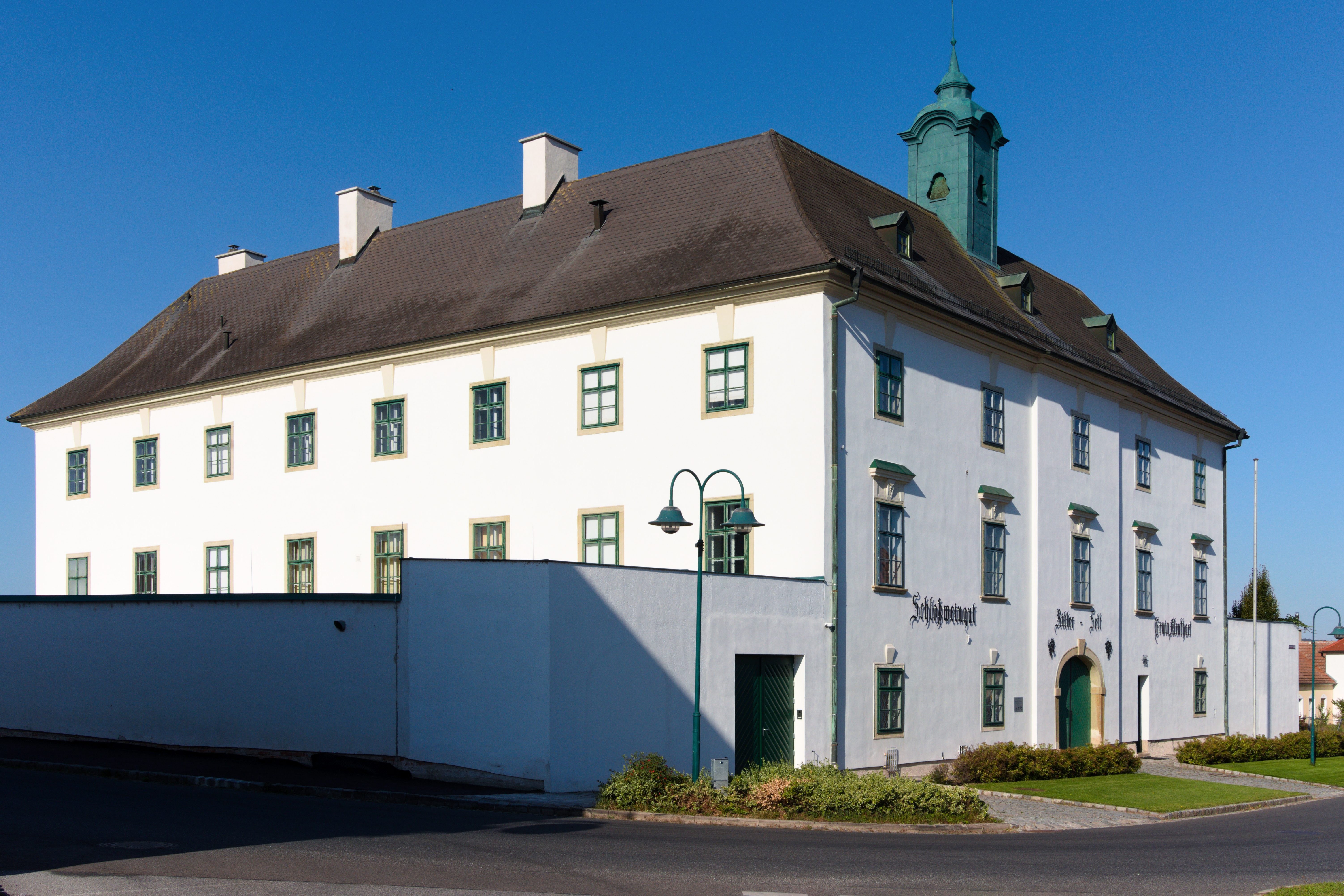 Außenansicht Schloss Raggendorf